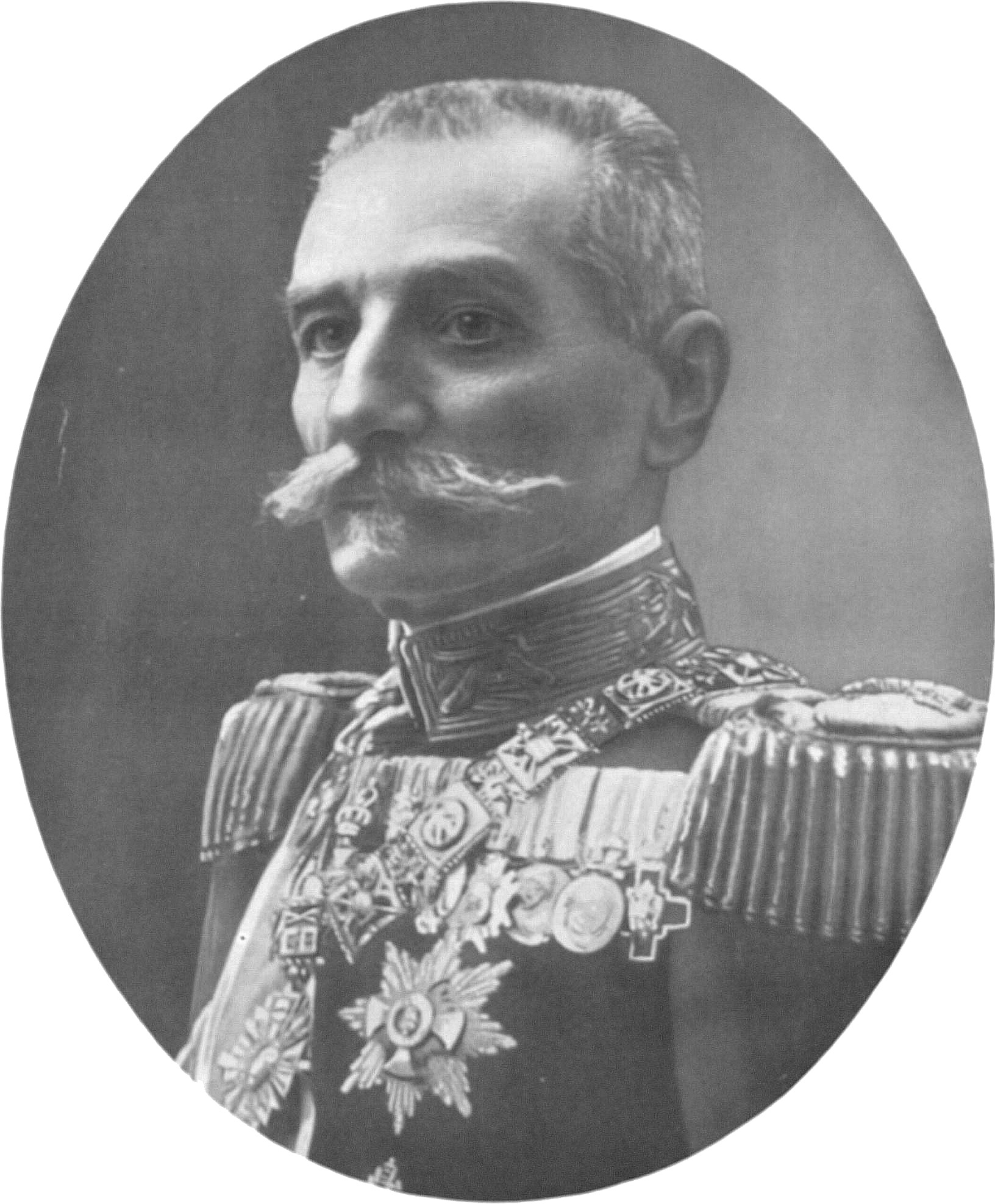 Srpskohrvatski / српскохрватски: Kralj Petar I, Veliki Oslobodilac